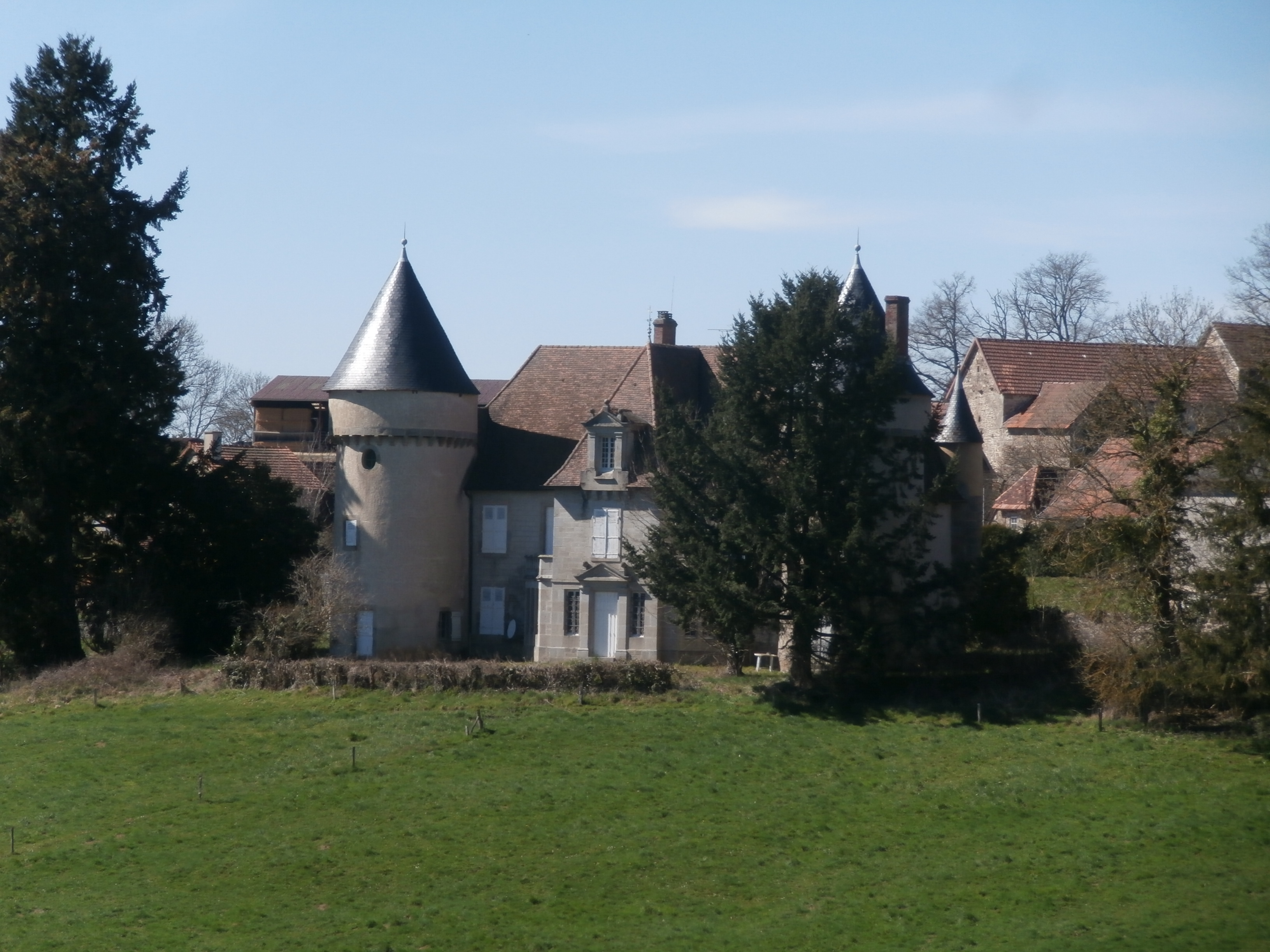 Château construit au XVIIe siècle